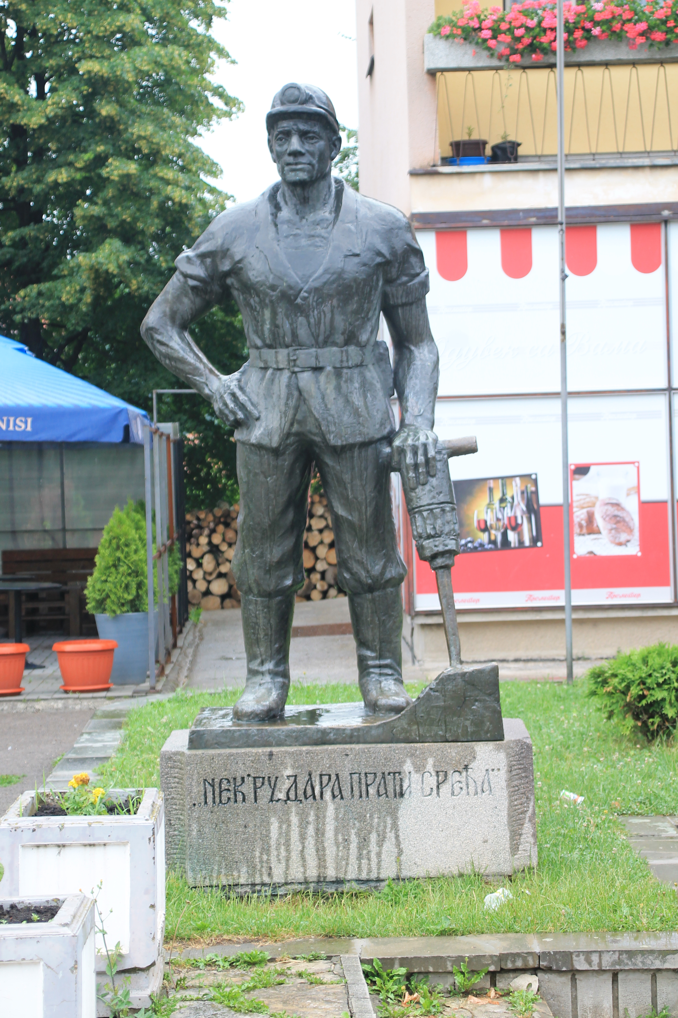 Rudnik (Gornji Milanovac)